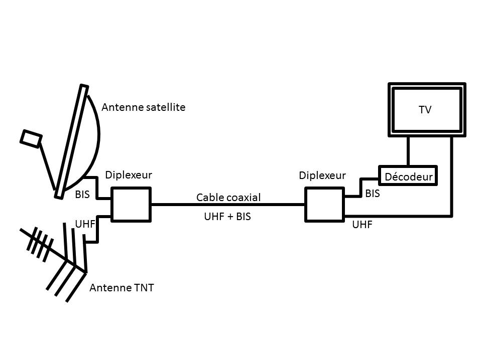 Utilisation de diplexeurs résidentiels - configuration typique